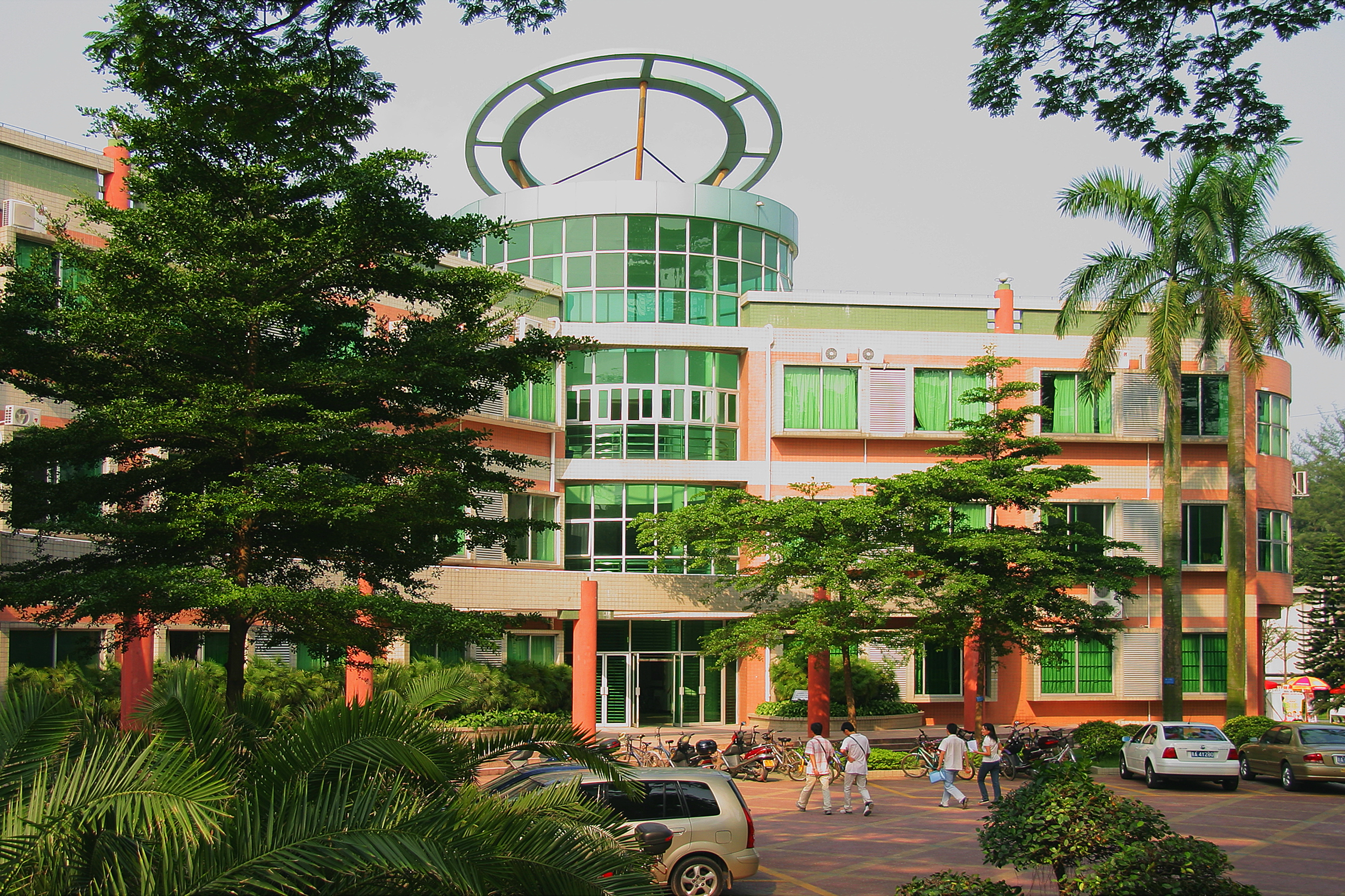 广州，华南农业大学，华山学生活动中心